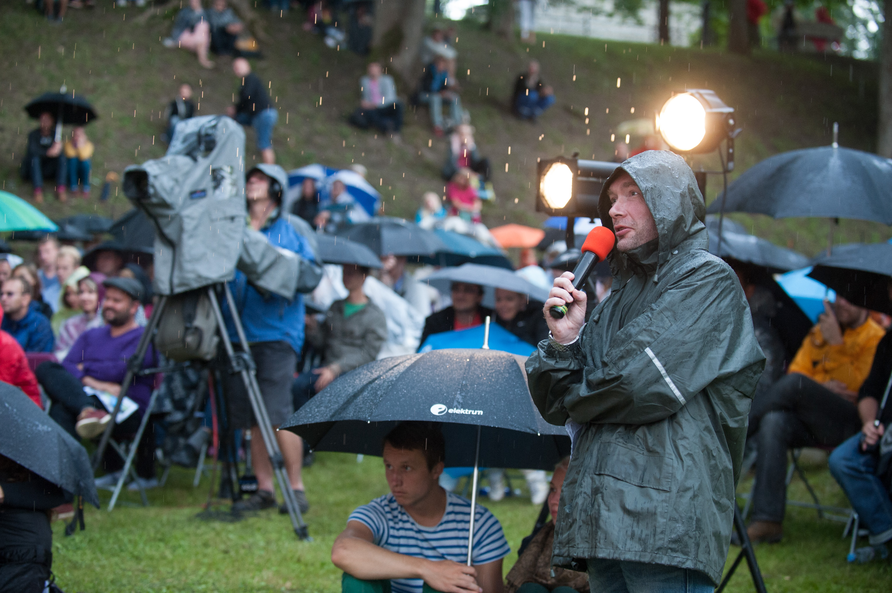 Arvamusfestival 2014; Parlamendierakondade juhtide debatt